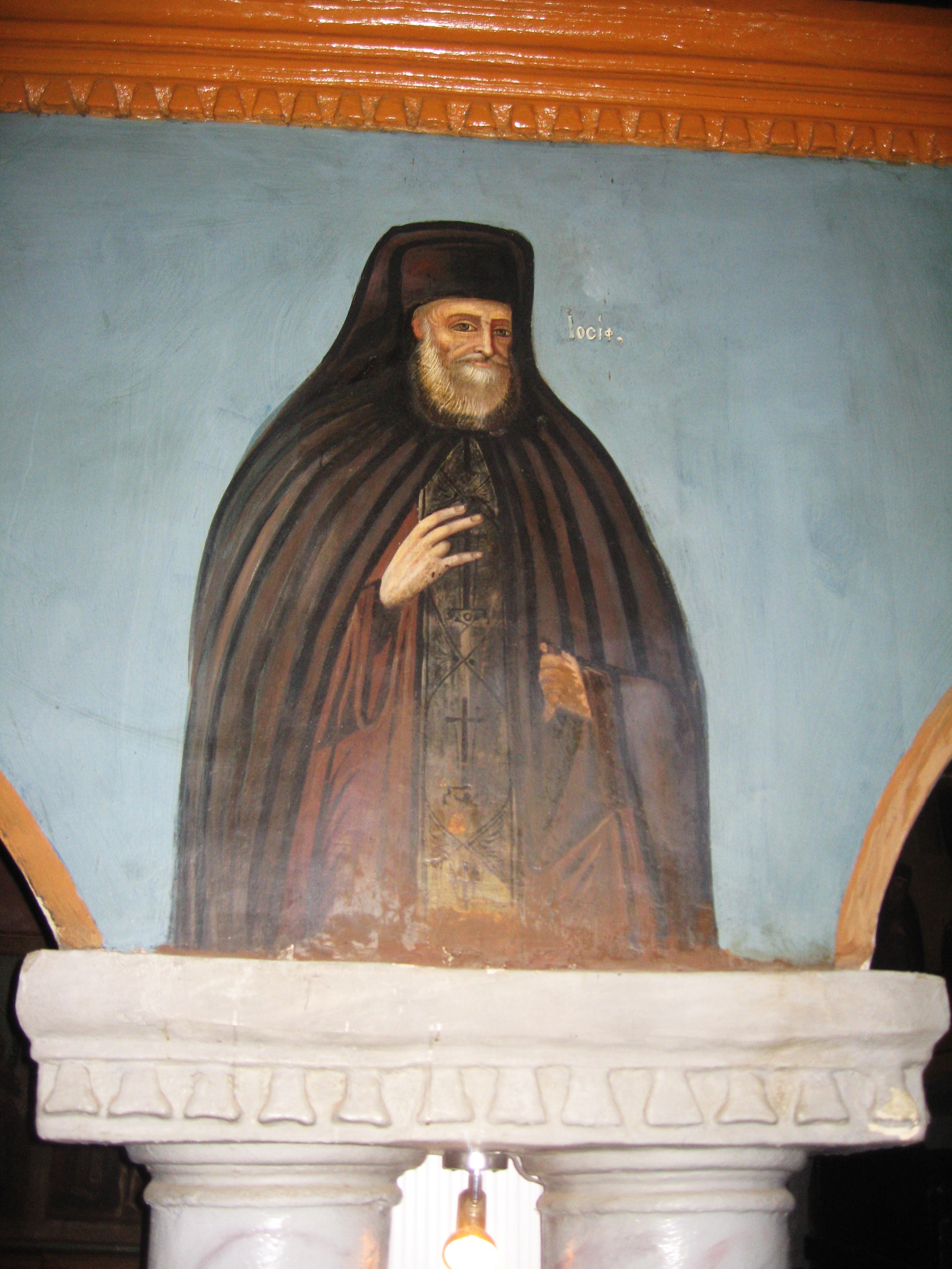 Mănăstirea Văratec - painture from 1887